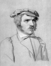 Johann Michael Knapp (1791-1861) Stuttgart, Hof-Architekt